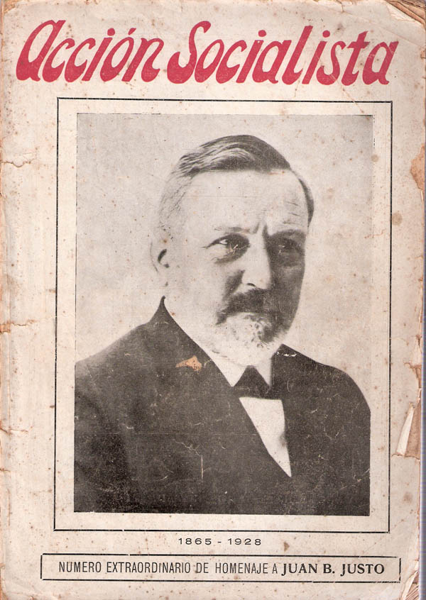 Tapa de la revista Accion Socialista con Foto de Juan B Justo